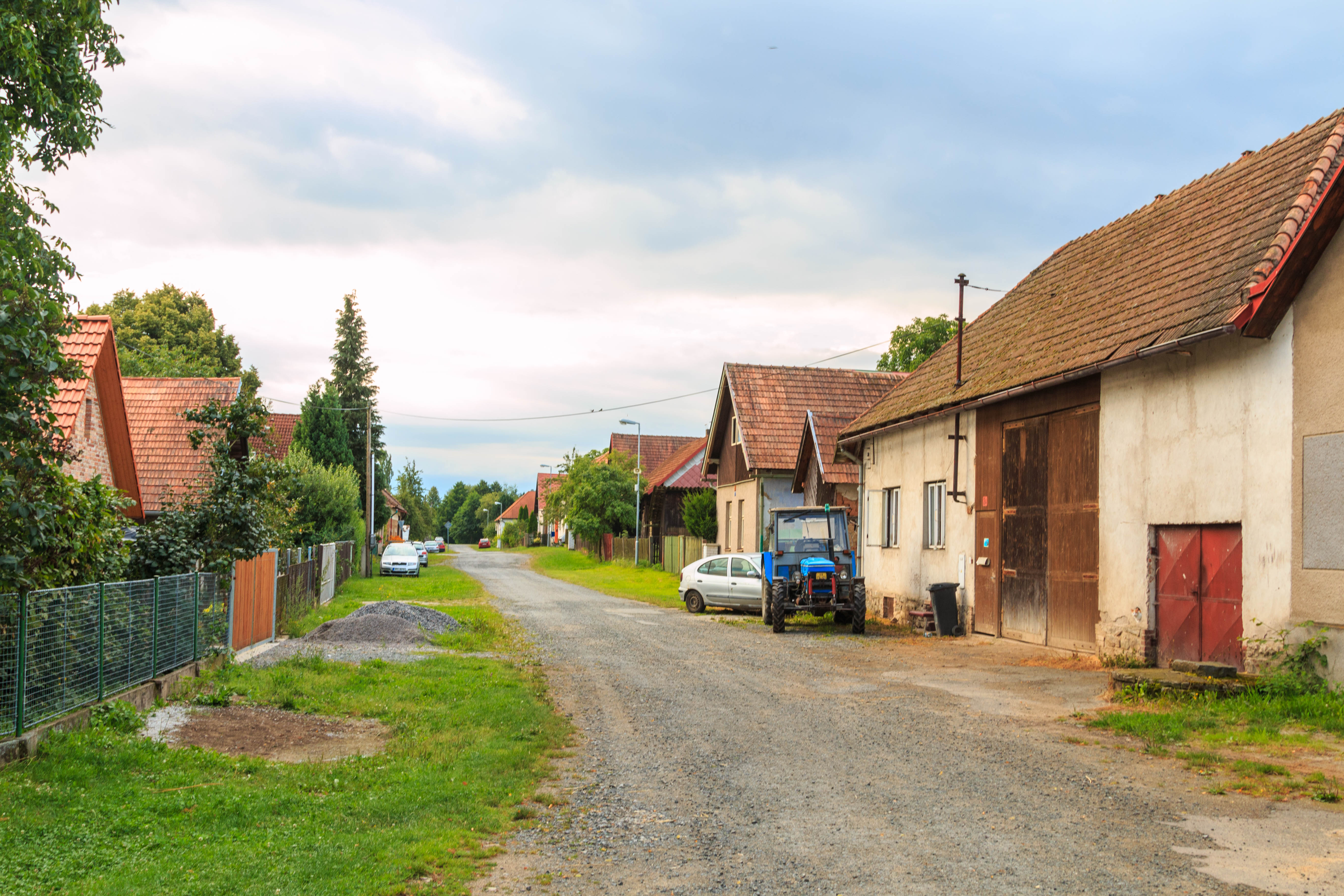 Nový Dvůr č. 2